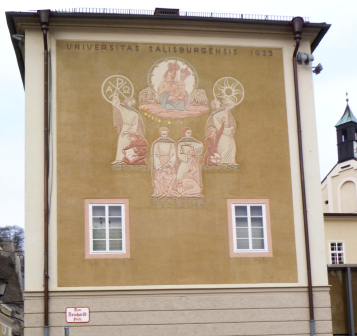 Universitätsbibliothek Salzburg